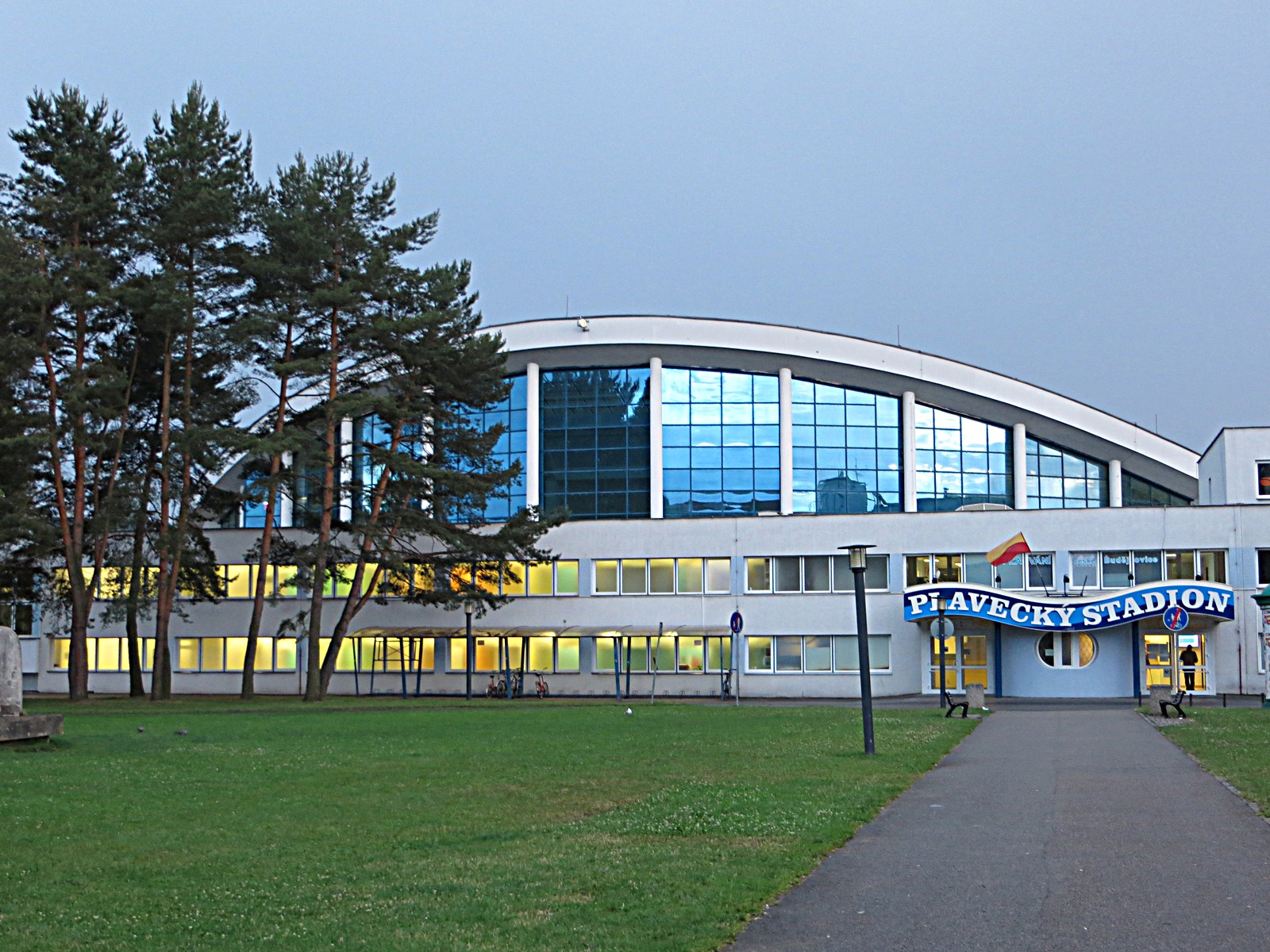 Plavecký stadion a sauna